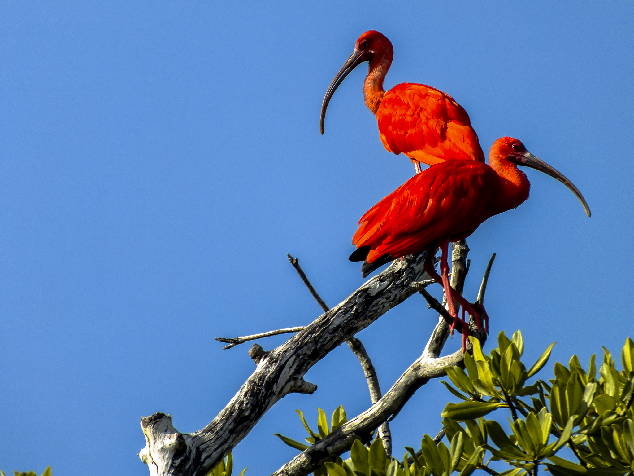 Aves caracteristicas del Parque Nacional Morrocoy